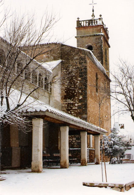 Iglesia de San Lorenzo Mártir, El Ballestero (Albacete).